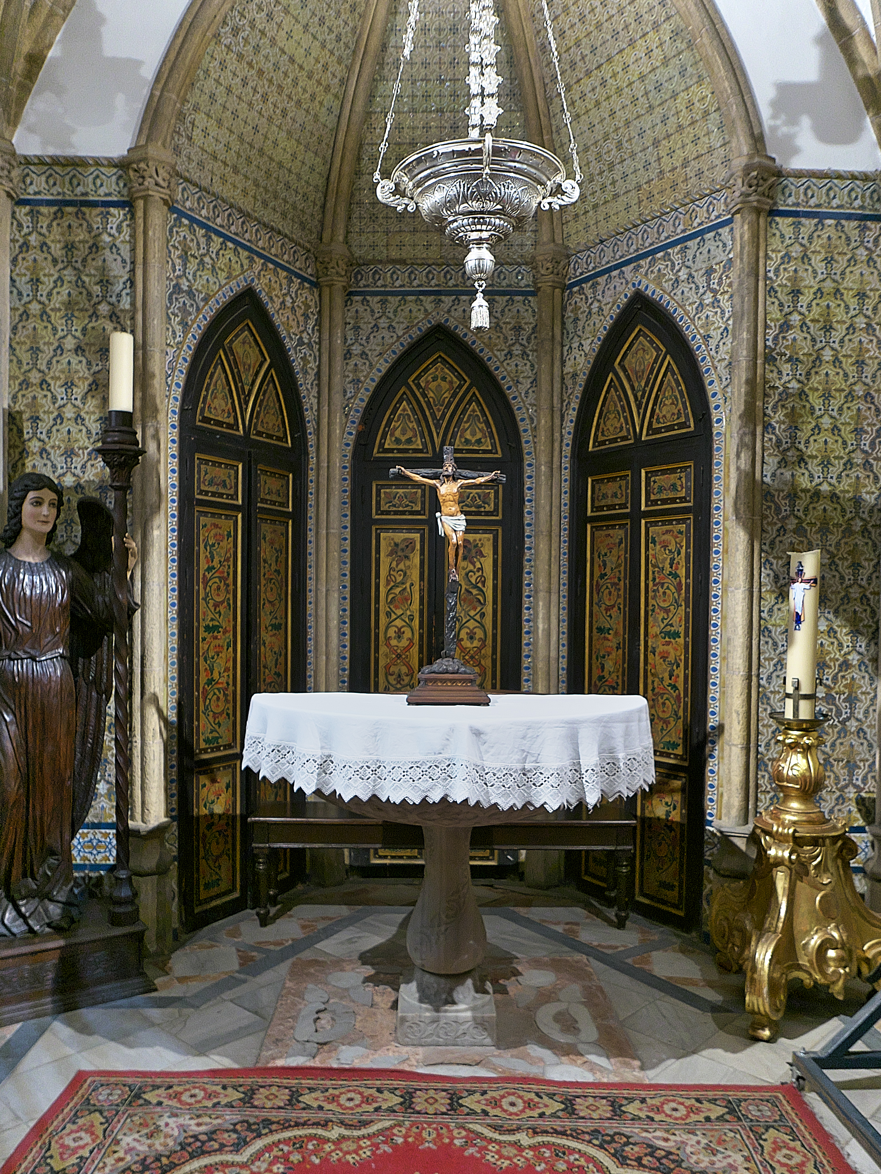 Iglesia de San Pedro (Sevilla). En esta capilla, recibió el bautismo, Diego Rodríguez de Silva y Velázquez. En Sevilla a seis de junio de mil quinientos noventa y nueve.